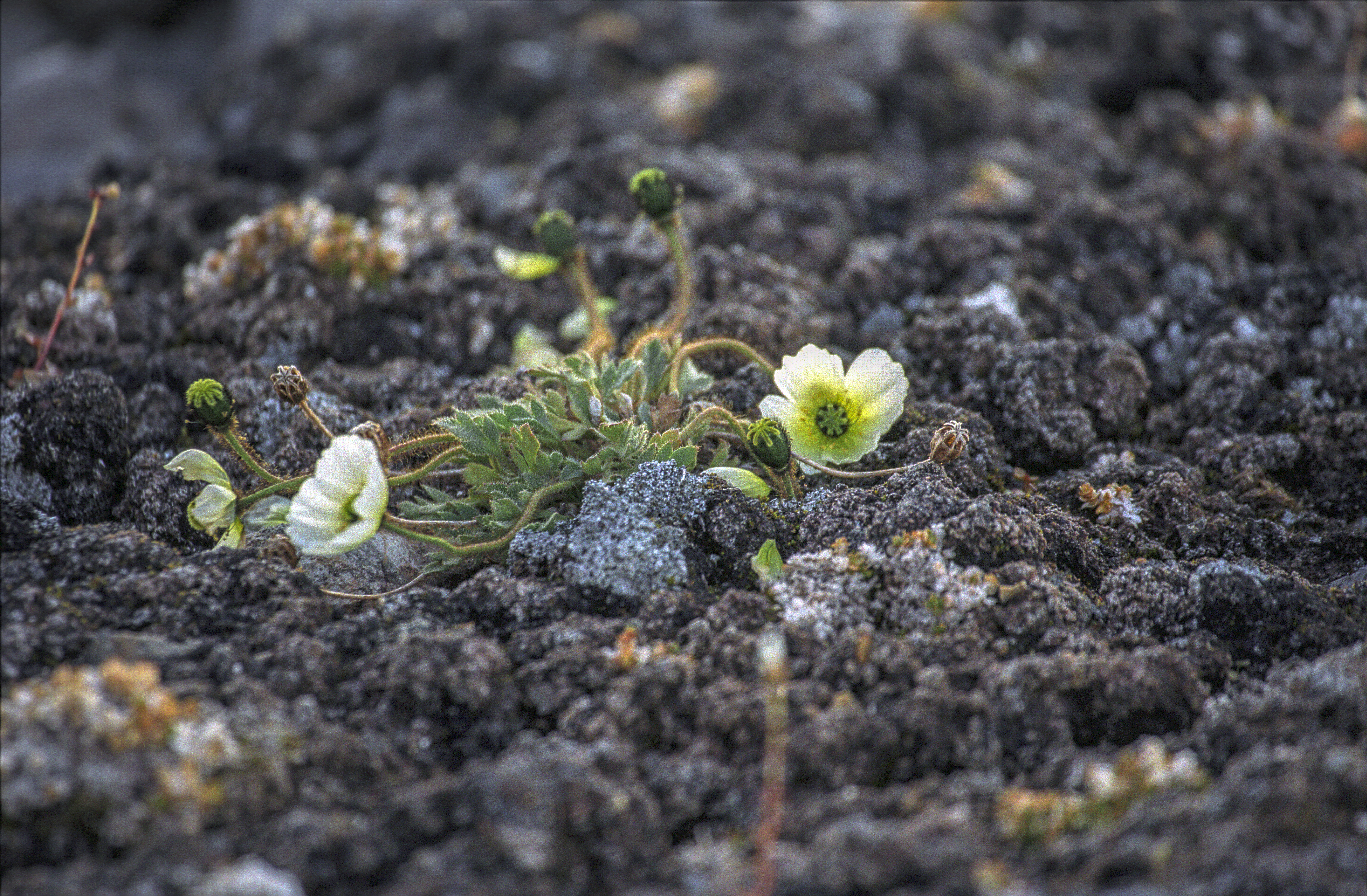 Svalbard, Nordaustlandet, Papaver dahlianum, Svalbard poppy, mak swalbardzki